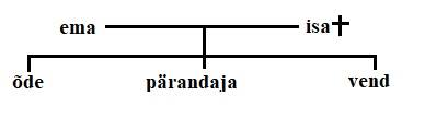 Pärandajal ei ole ühtegi esimese järjekorra pärijat (alanejaid sugulasi), seega pärivad teise järjekorra pärijad (pärimise järjekorra põhimõte). Ema ja isa päriksid kumbki ½, aga isa on surnud. Seega astuvad isa asemele isa alanejad sugulased, kelleks on õde ja vend (asenduspõhimõte). Õde ja vend pärivad kokku sama suure osa, kui oleks pärinud isa. Ema pärib ½, õde ¼ ning vend ¼.